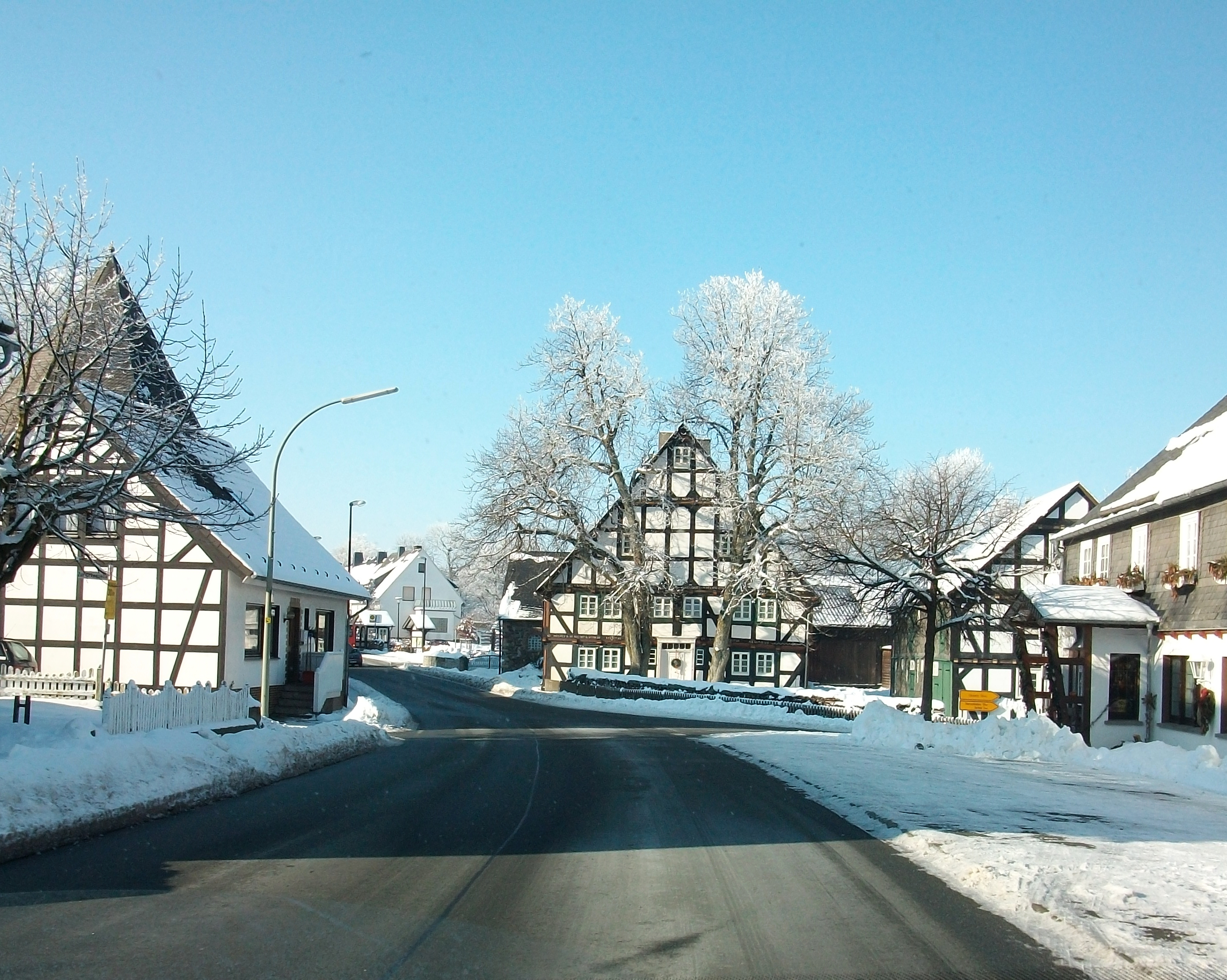 Medebach-Küstelberg (Germany)